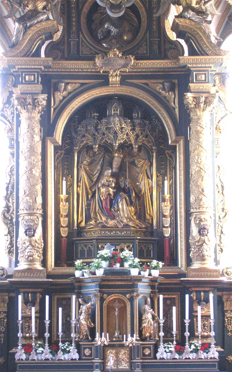 St. Maria, München-Ramersdorf, Hauptaltar